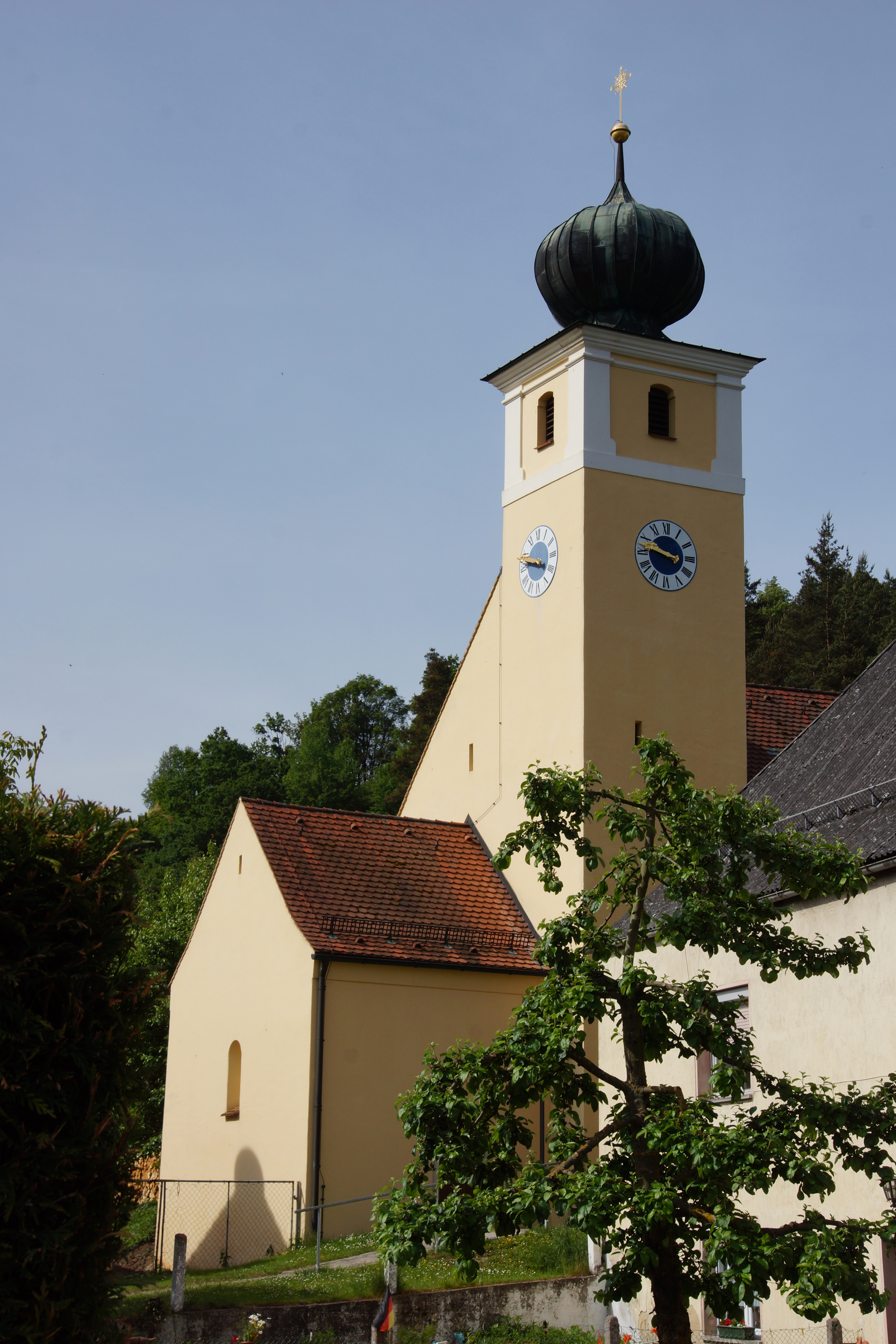 Die kathoische Filialkirche St. Jakobus in Emhof bei Schmidmühlen